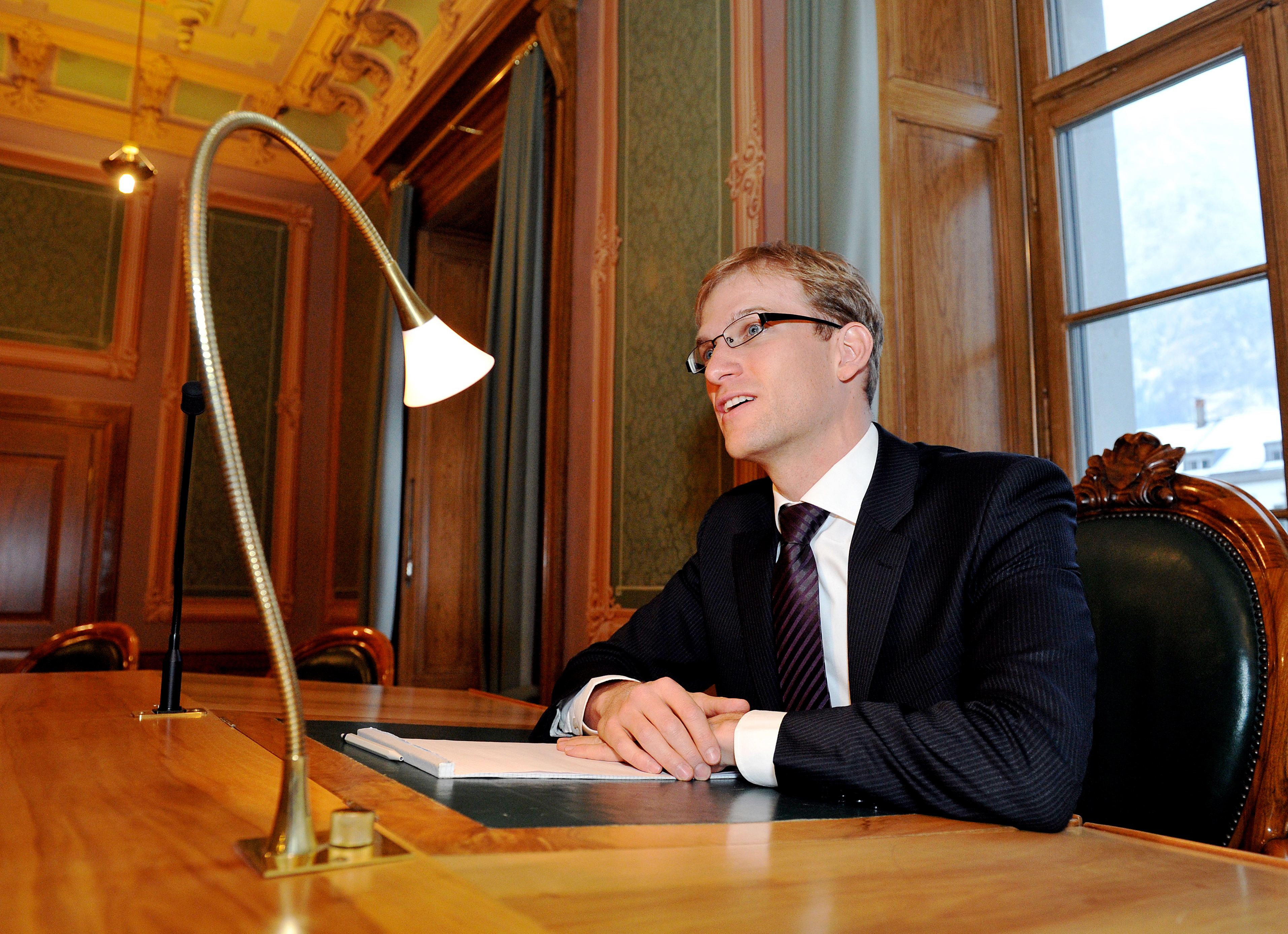 Yves Rüedi im Gerichtssaal